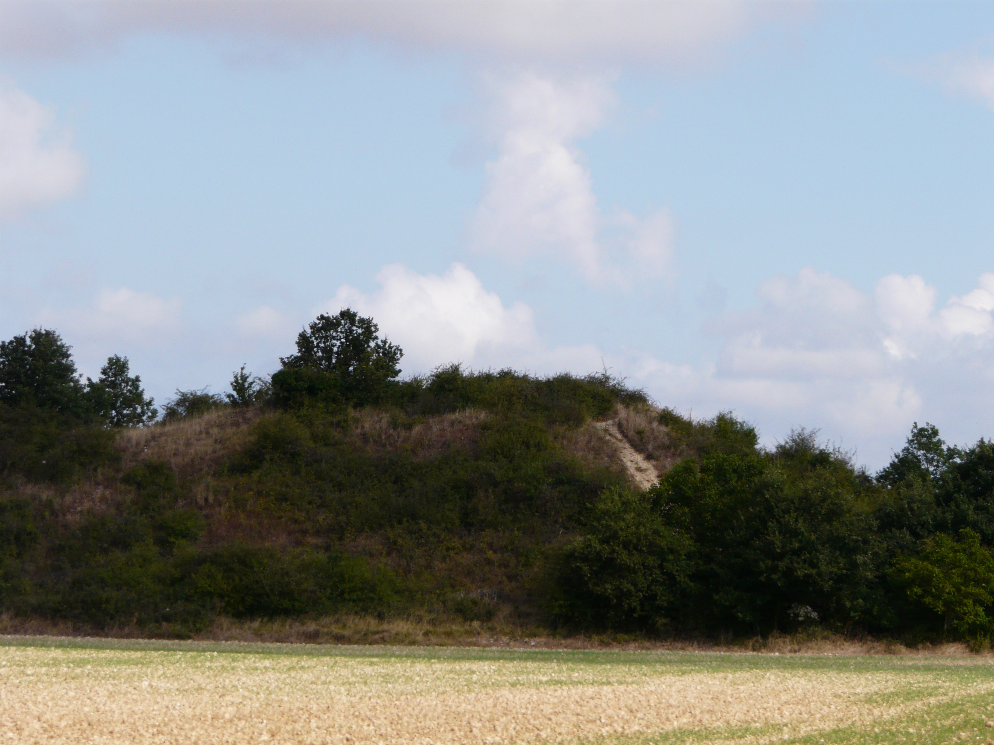 Le tumulus de la Motte de Puytaillé, Assais-les-Jumeaux, Deux-Sèvres, France.